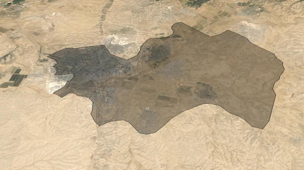 בקעת באר שבע